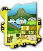 EScudo de armas de Llera Tamaulipas